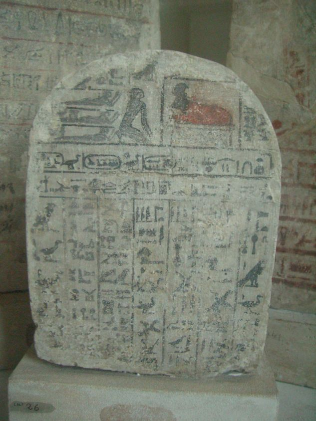 Stèle de l'Apis enterré en l'an 11 du règne de Sheshonq V, trouvée à Saqqarah - XXIIe dynastie égyptienne - Musée du Louvre